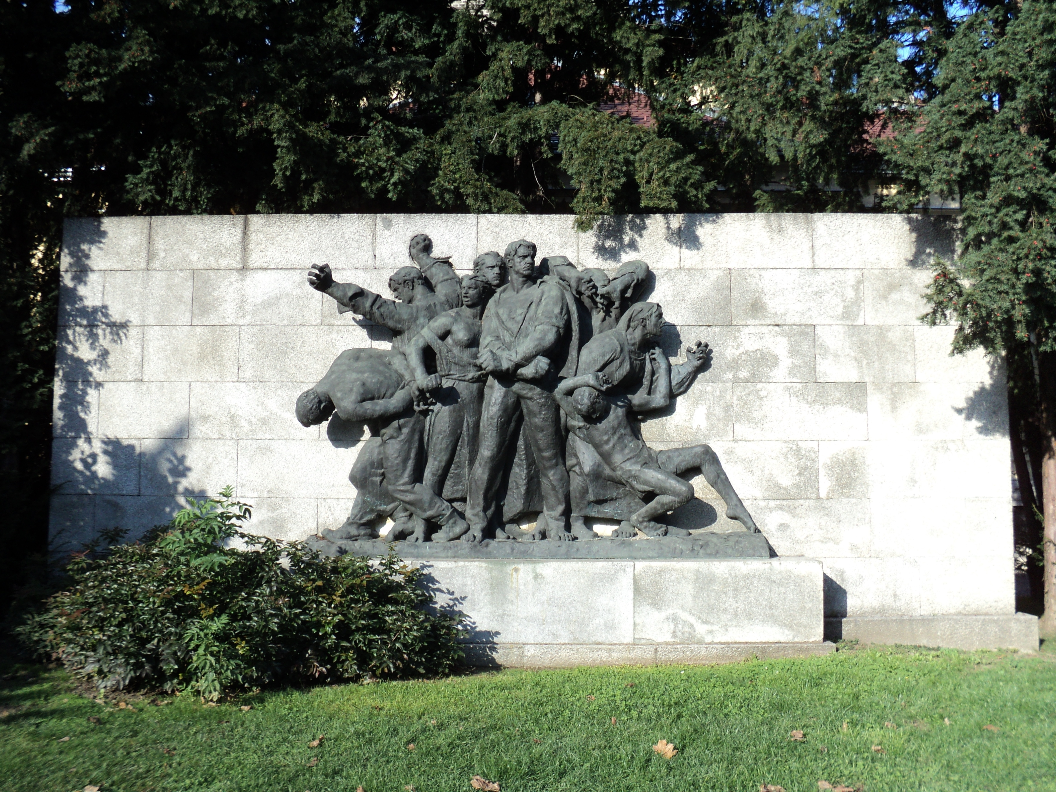 Spomenik Streljanje talaca, rad Frane Kršinića, trg Josipa Jurja Štrosmajera u Zagrebu